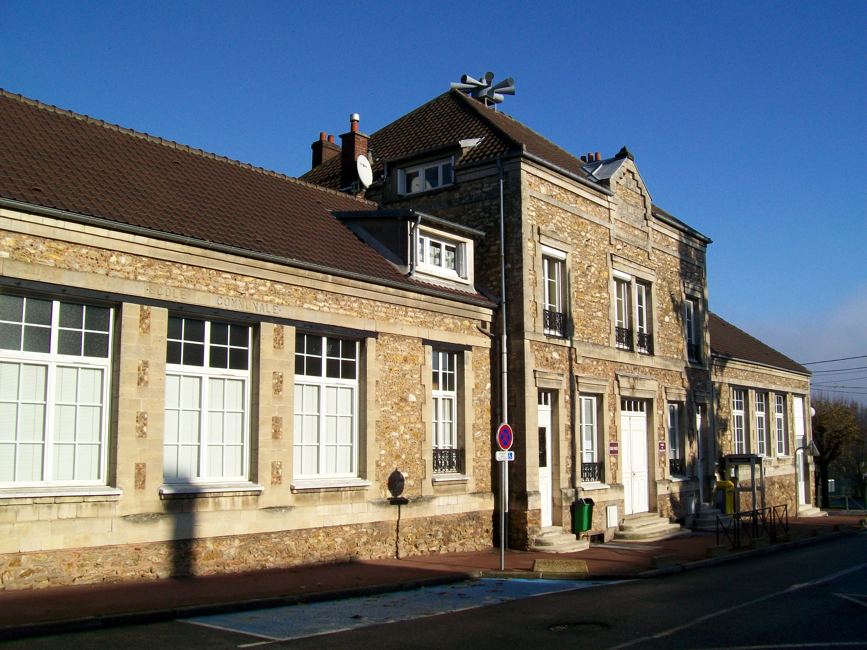 La maison des associations dans l'ancienne mairie-école de 1889.